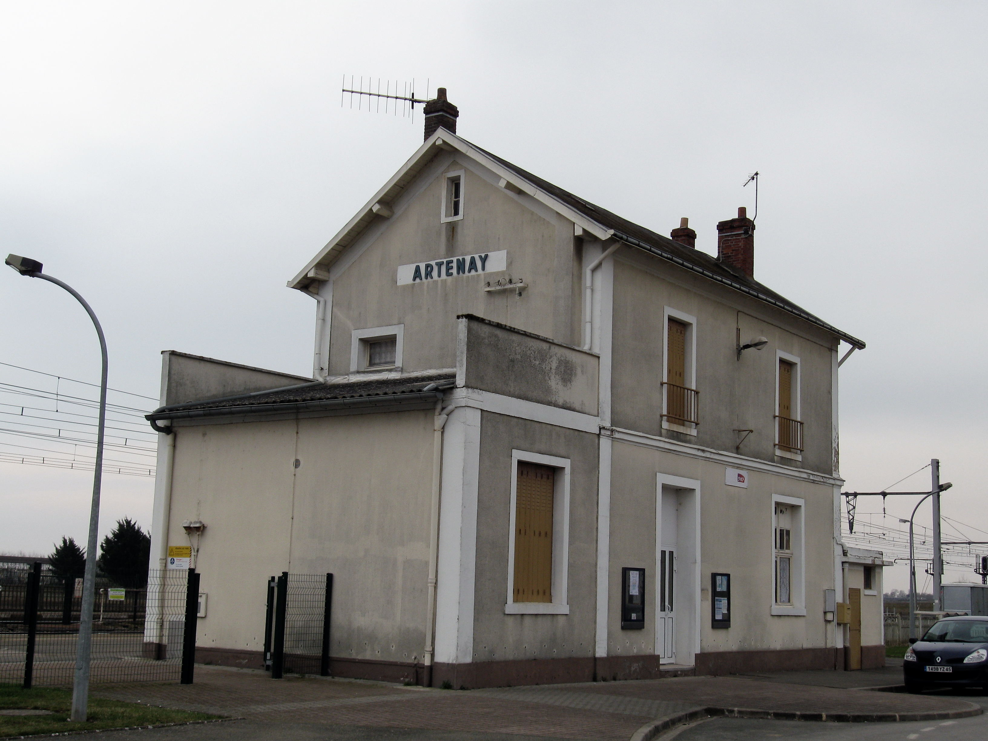 Gare d'Artenay, Loiret, France